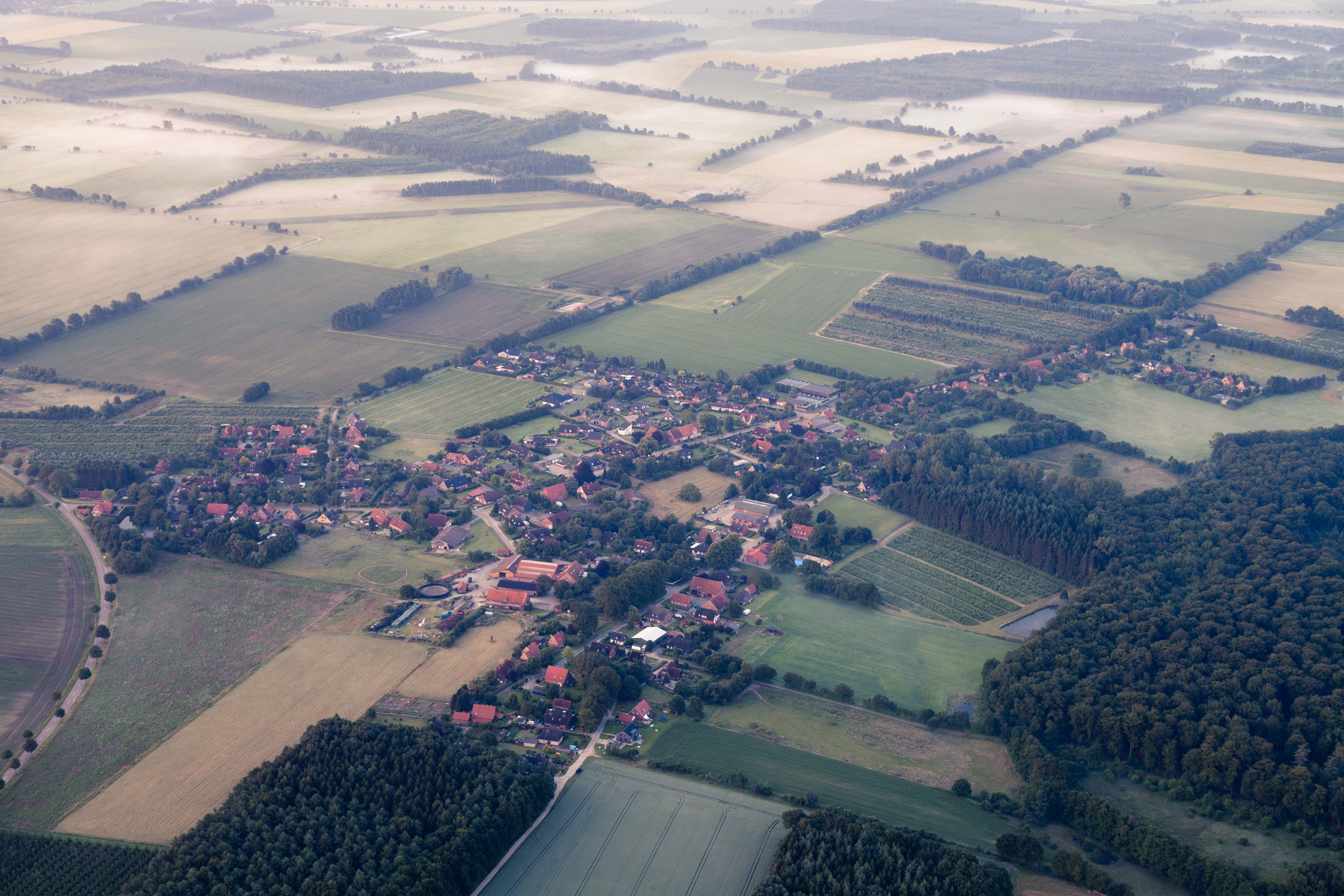 Der Ort Ruschwedel